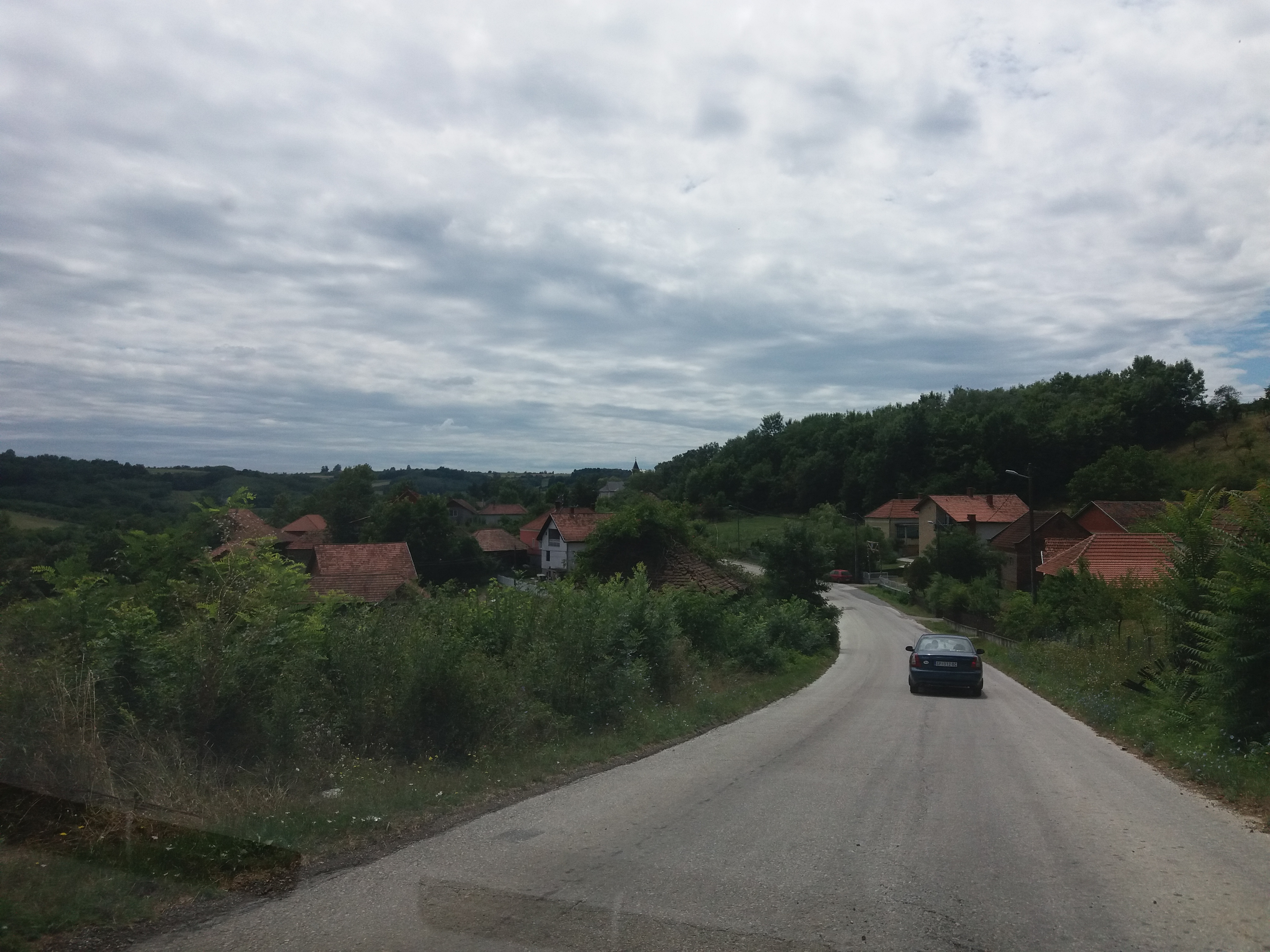 Stojačak (Smederevska Palanka)